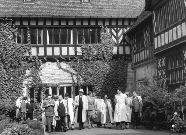 Zentralbild-Nitsche So-Noa 15.9.1957 Rumänische Parlamentarier besuchen Nationale Gedenkstätten in Potsdam Am 15.9.1957 besuchten die Mitglieder der in der DDR weilenden Delegation von Abgeordneten der Großen Nationalversammlung der Volksrepublik Rumänien Sanssouci und dem Cecilienhof in Potsdam. UBz.: Die Abgeordneten vor dem Cecilienhof.